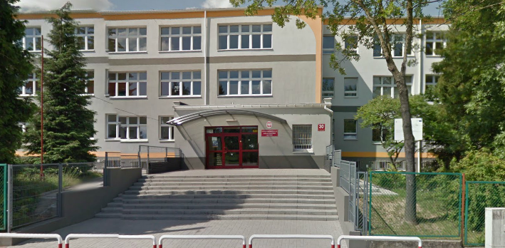 I LO Radomsko autor PrincessLunalel